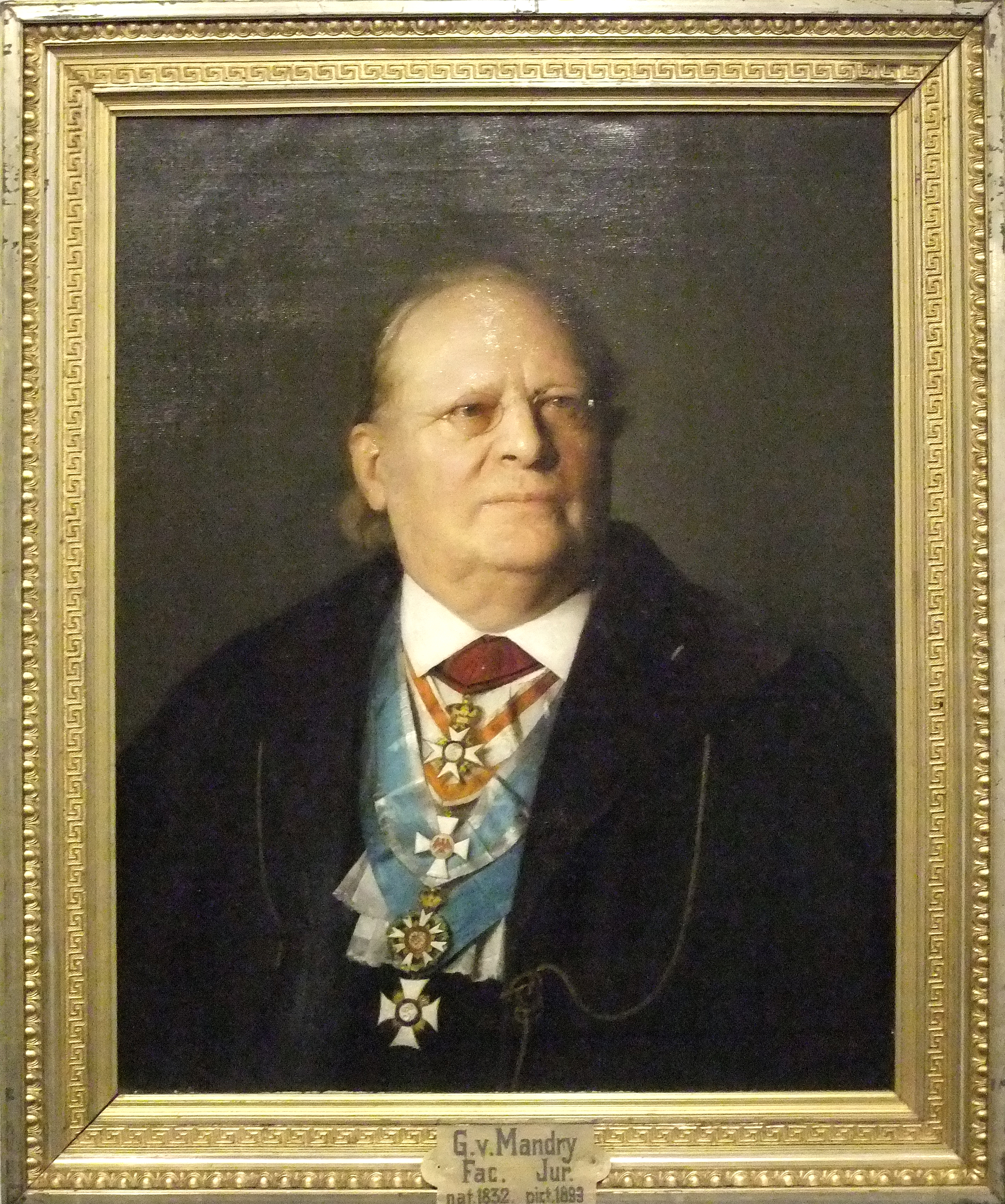 Prof. Gustav von Mandry (Öl auf Leinen, Tübinger Professorengalerie)